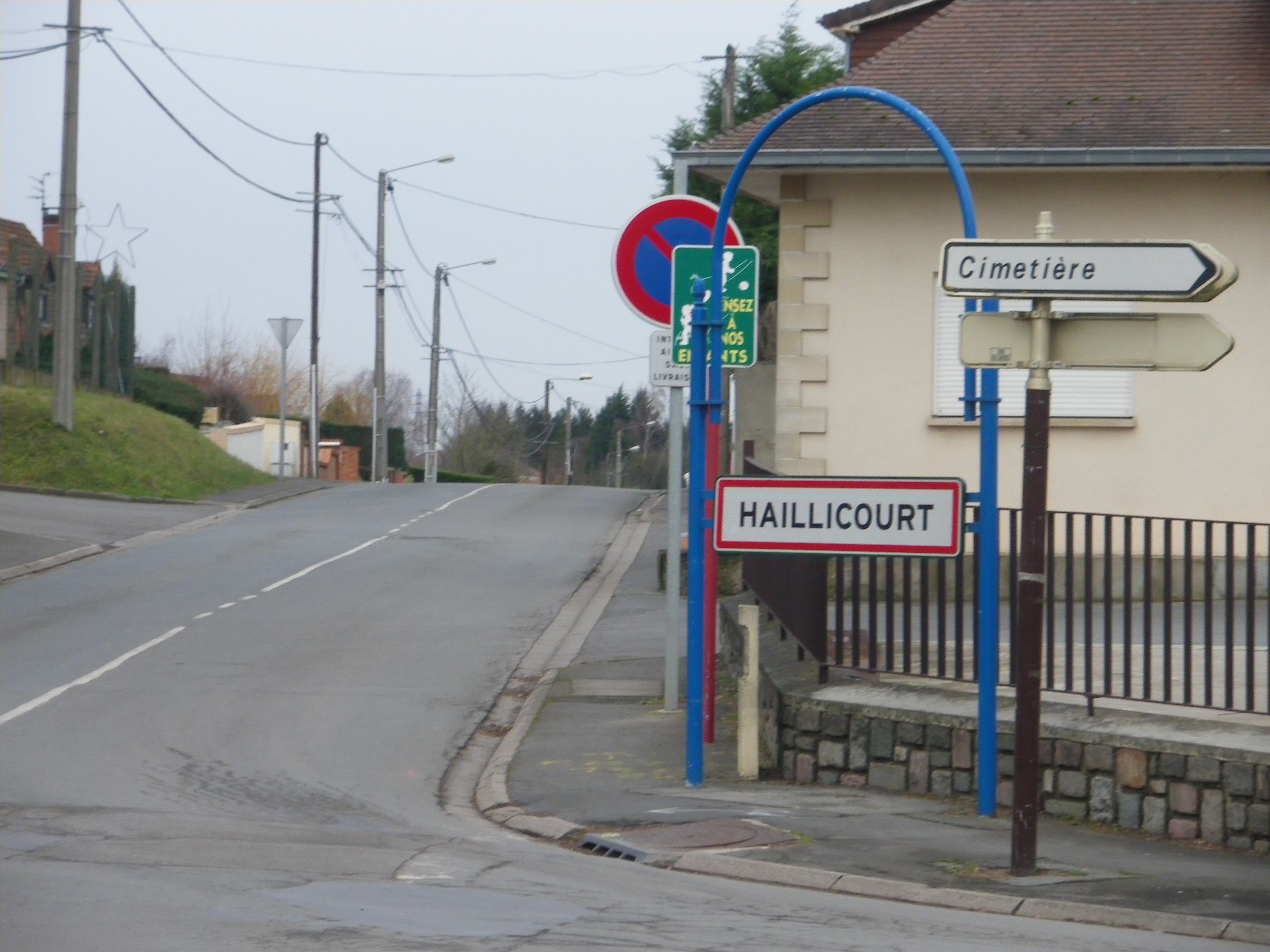 Vue d'une entrée de la commune d'Haillicourt.